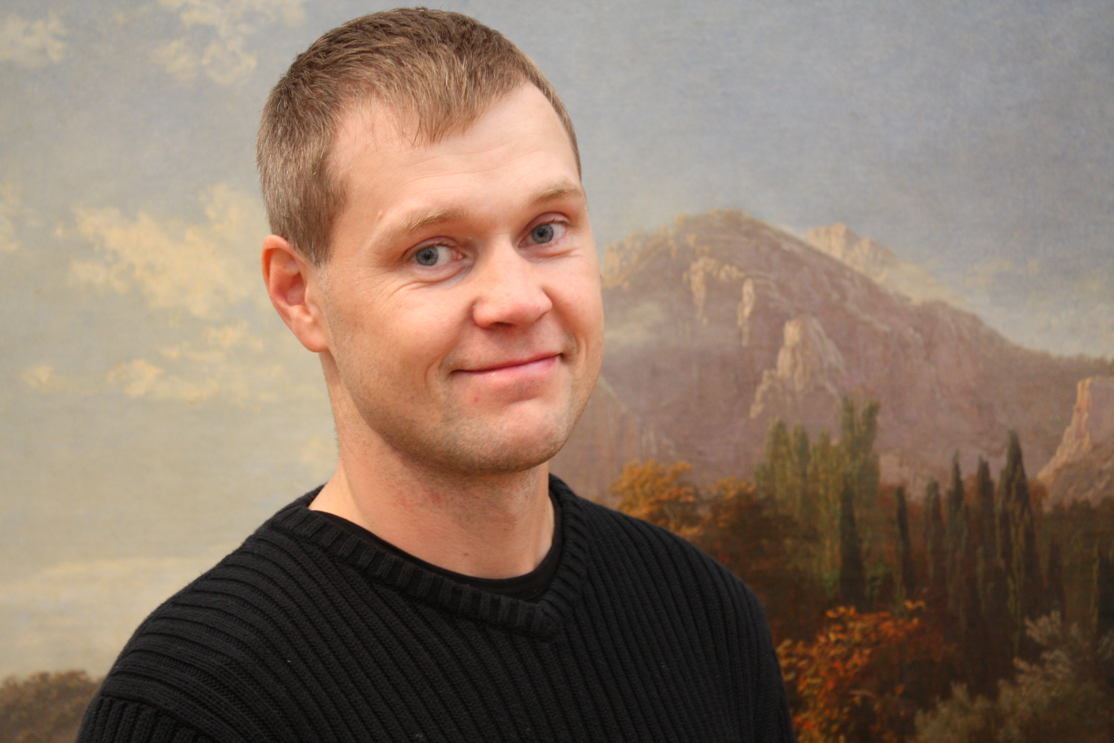 Porträttfotografi av Erik Johansson, bonde, författare, pyrotekniker och Anders Wall-stipendiat.